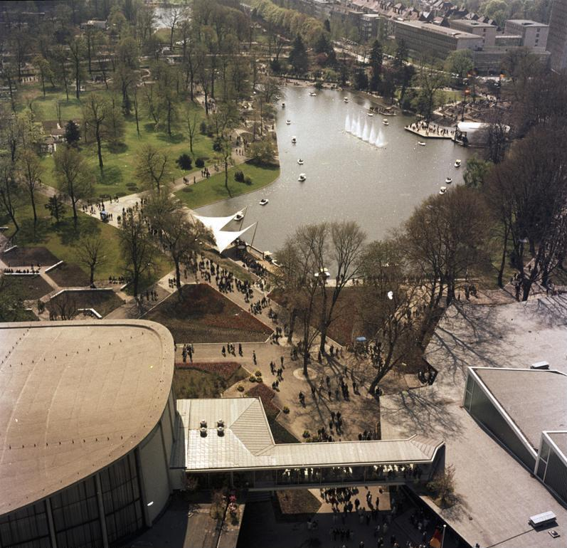 Bundesgartenschau 1967 Karlsruhe